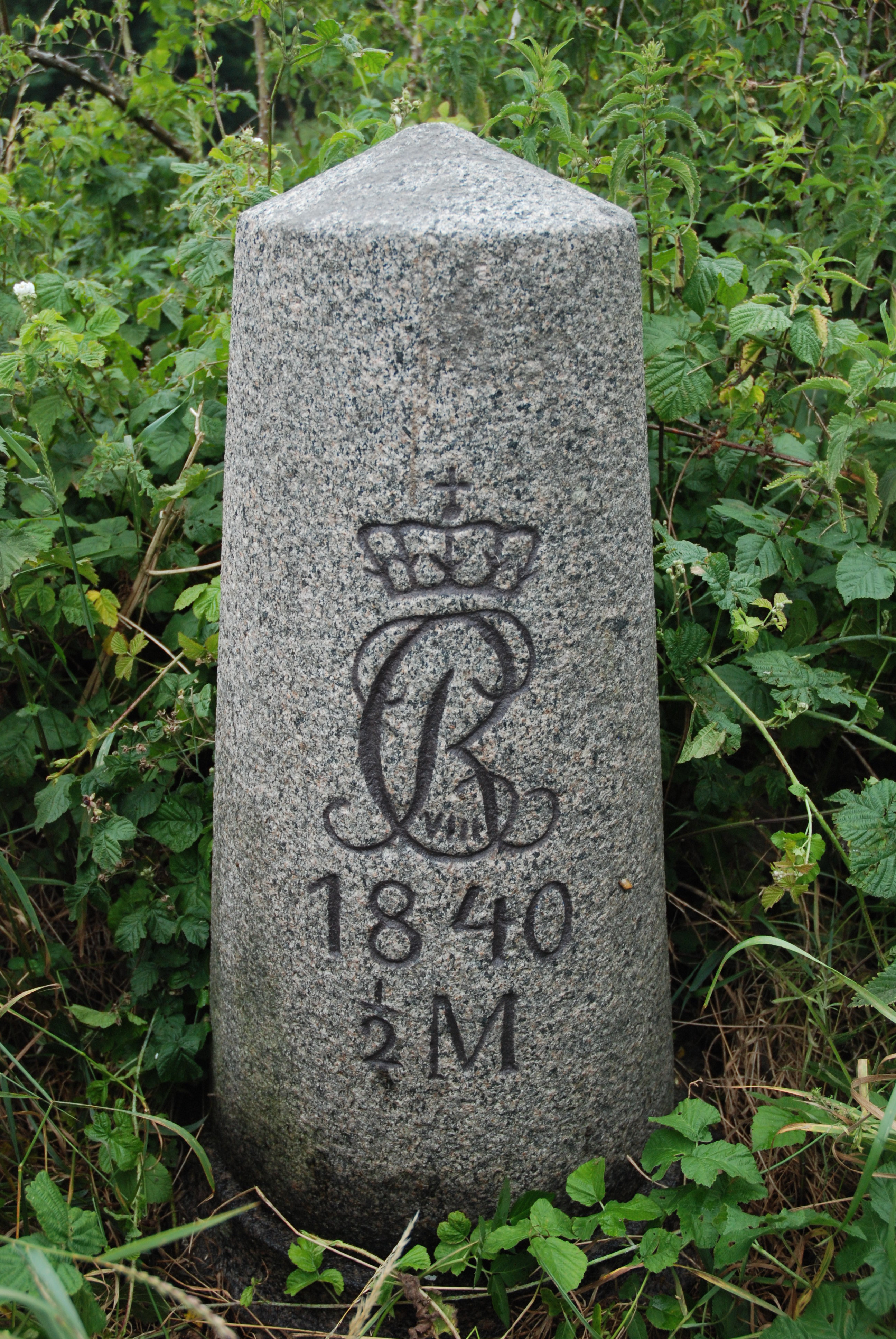 Halbmeilenstein an der Altona-Lübecker Chaussee